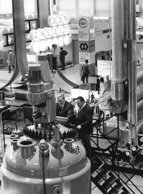 Leipzig, Herbstmesse, Autoklaven ADN-ZB Häßler 2.9.73 Gü Leipzig: Herbstmesse 1973- Der VEB Eisen- und Hüttenwerke Thale zeigt in der Ausstellungshalle der DDR-Chemie auf dem Messegelände einen neuentwickelten Autoklaven für die chemische Industrie.